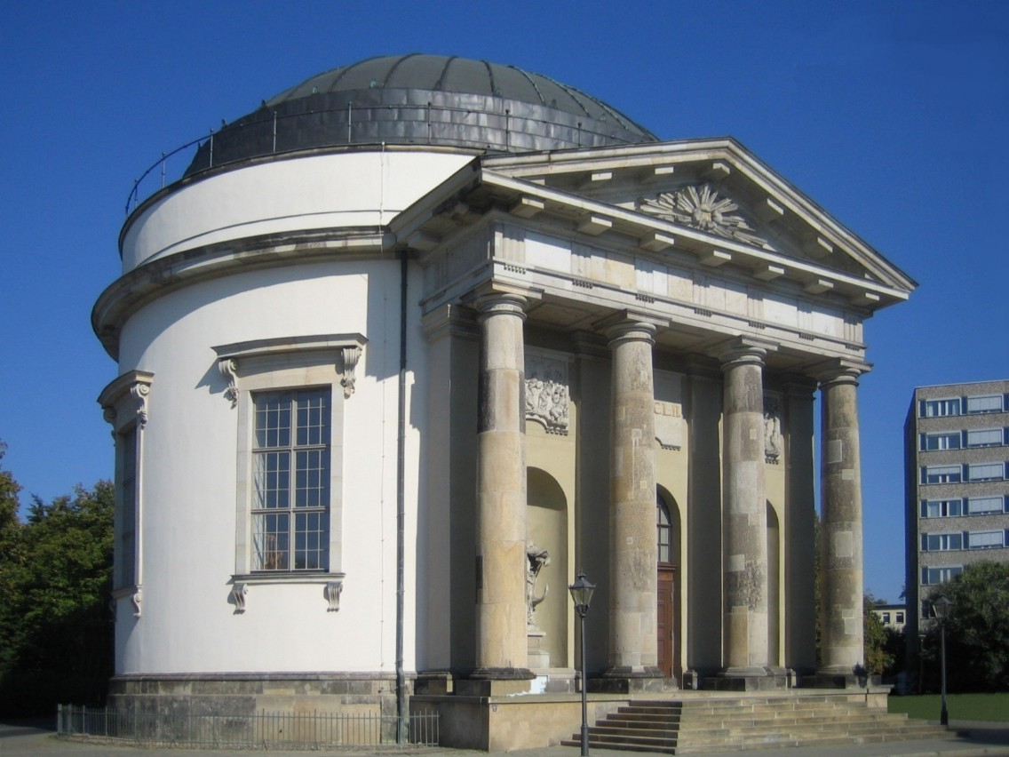 The "Französische Kirche" (French church) in Potsdam.